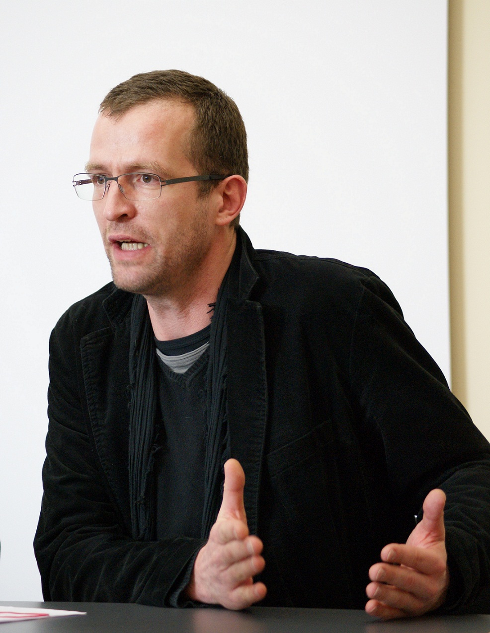 Tom Strohschneider bei einer öffentlichen Diskussion im April 2013